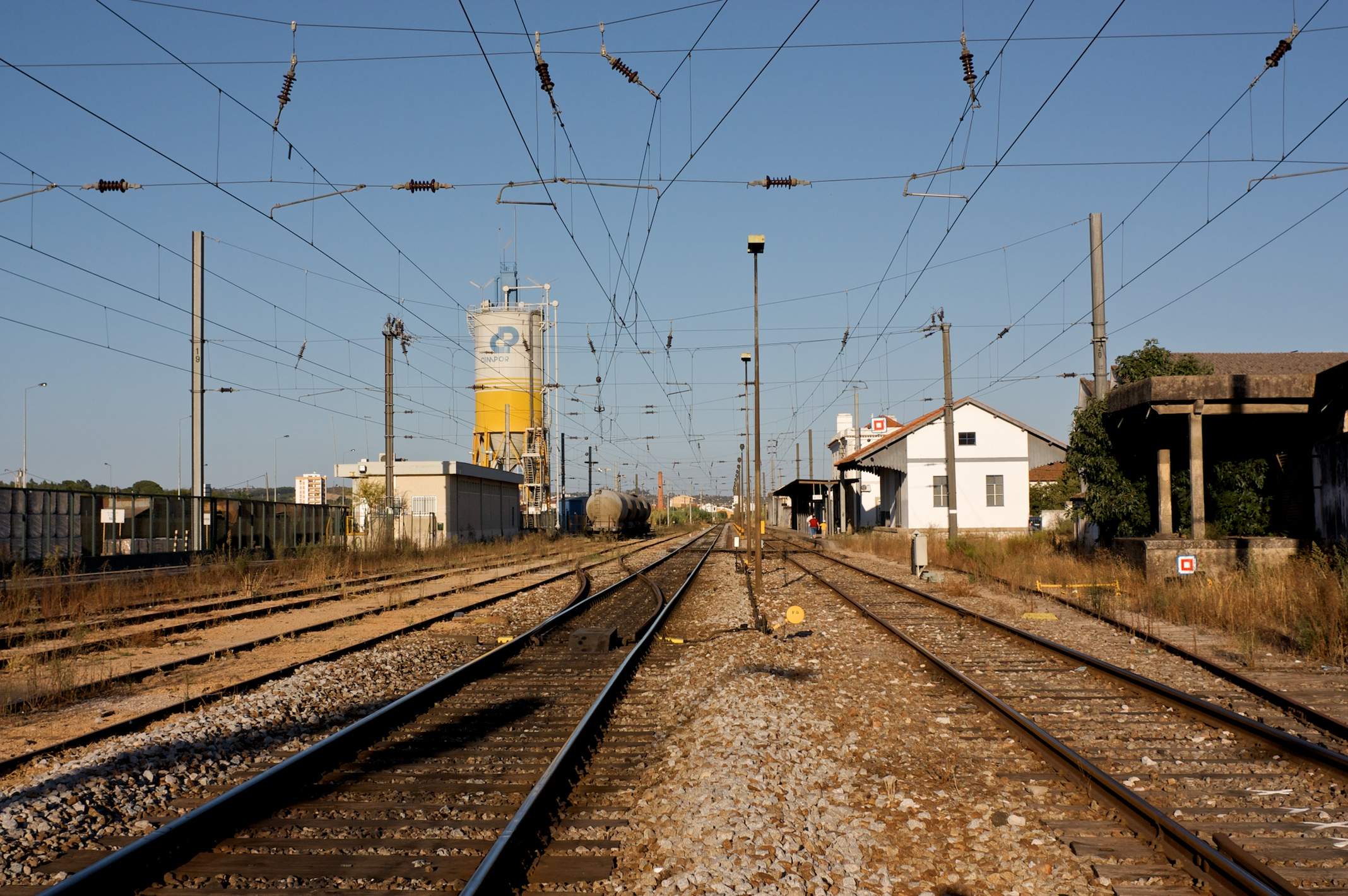 Tipo: ES Estação Satélite Local: Alferrarede Linha da Beira Baixa, PK 5 Data e hora: 15 de Setembro de 2009 18h31